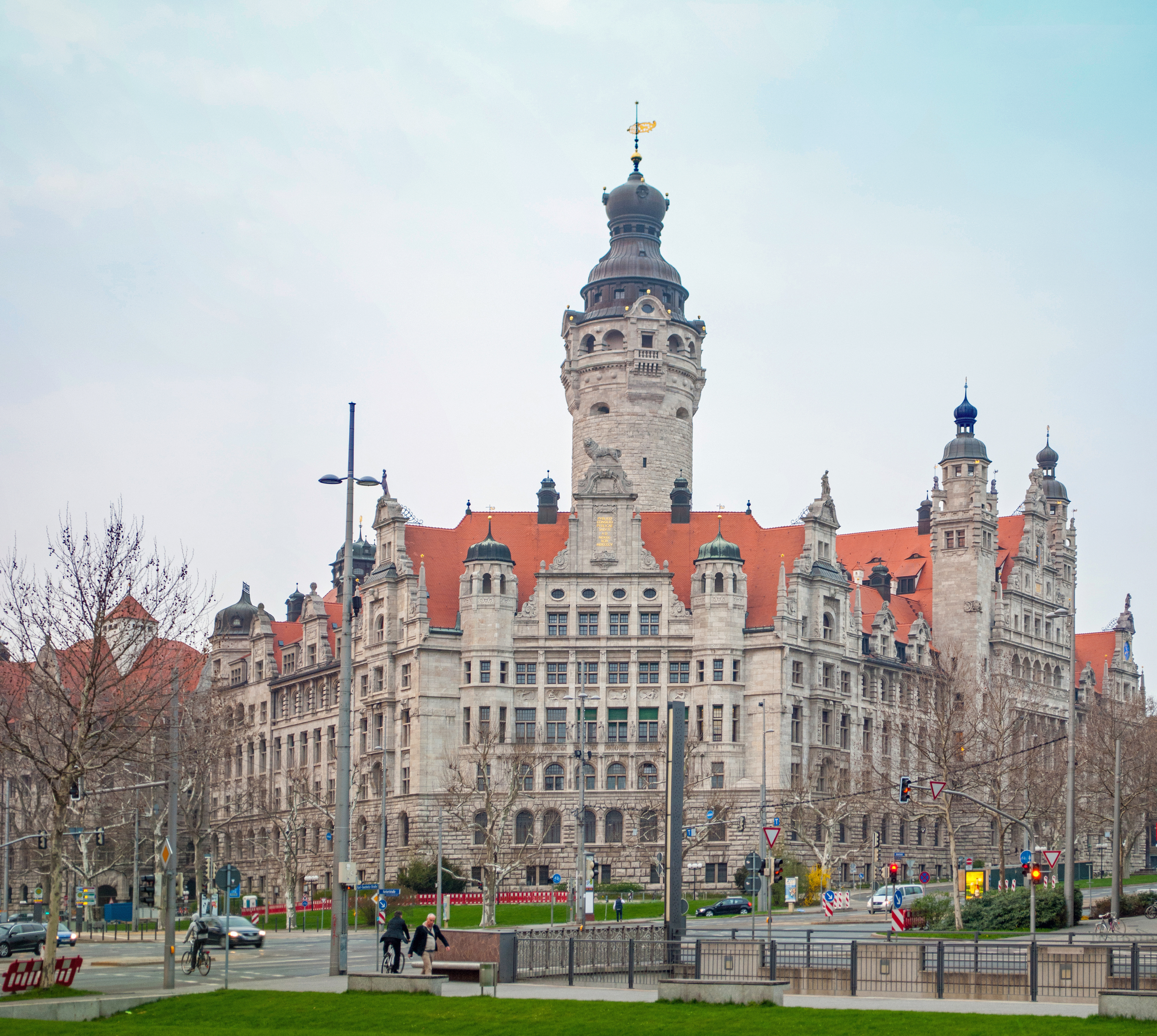 Neues Rathaus in Leipzig, Vorderansicht